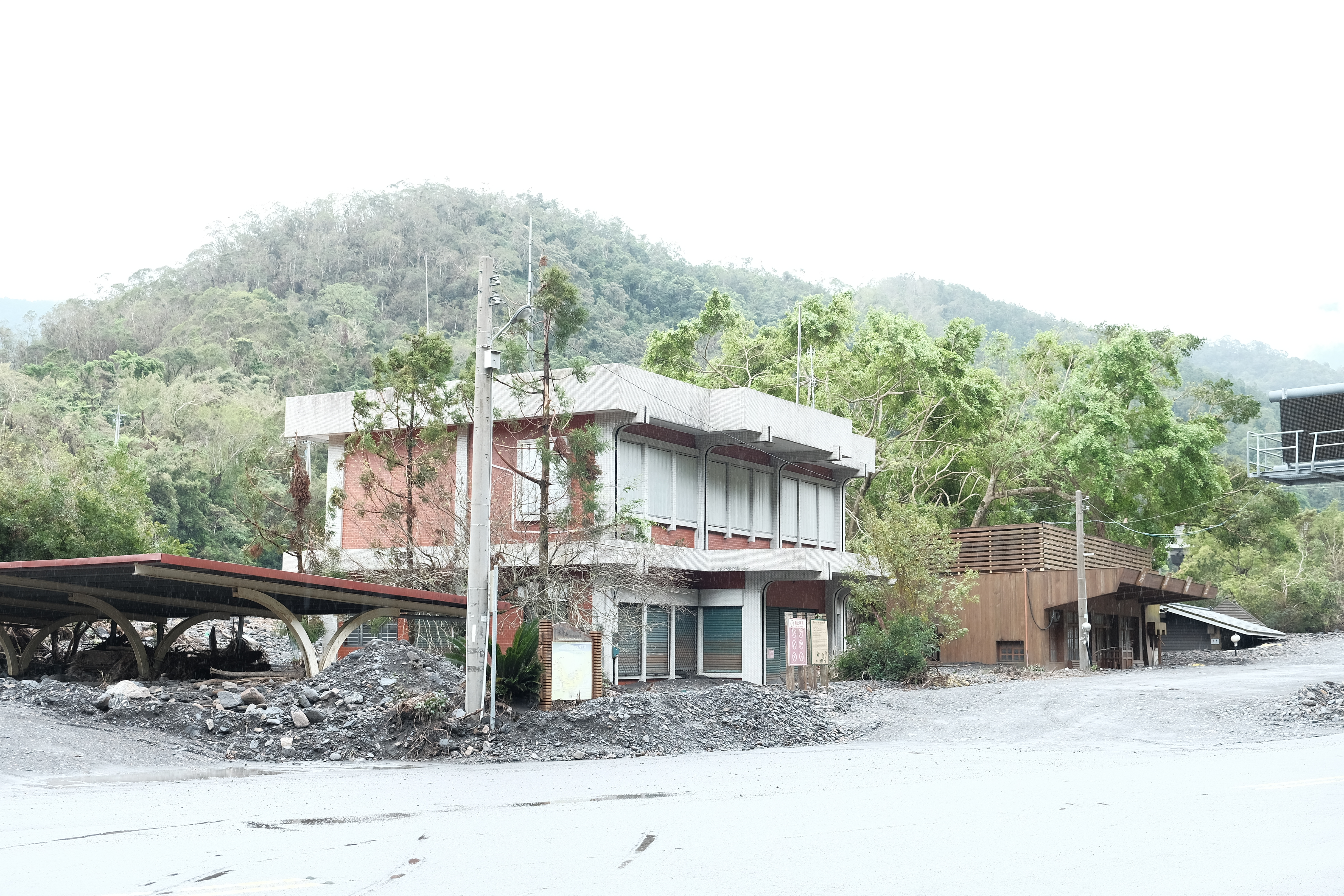 2015蘇迪勒颱風影響太平山土場淹沒